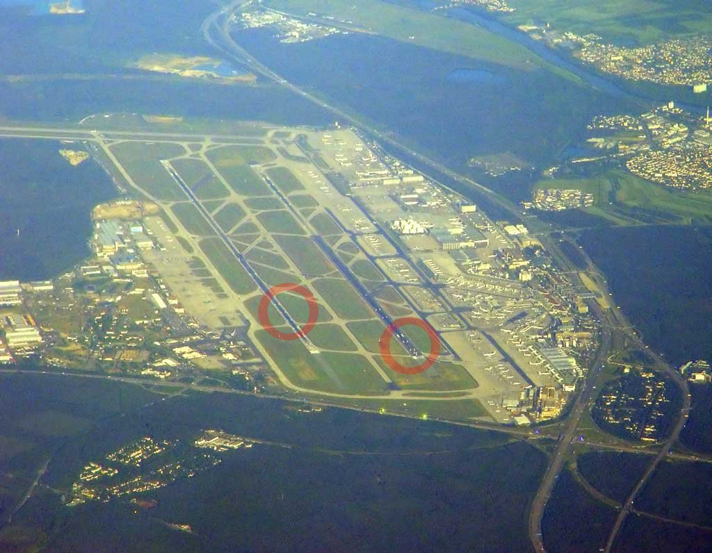 Frankfurt Flughafen Runways